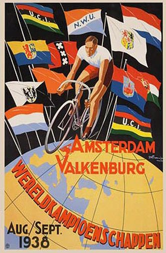 Championnats du monde de cyclisme 1938